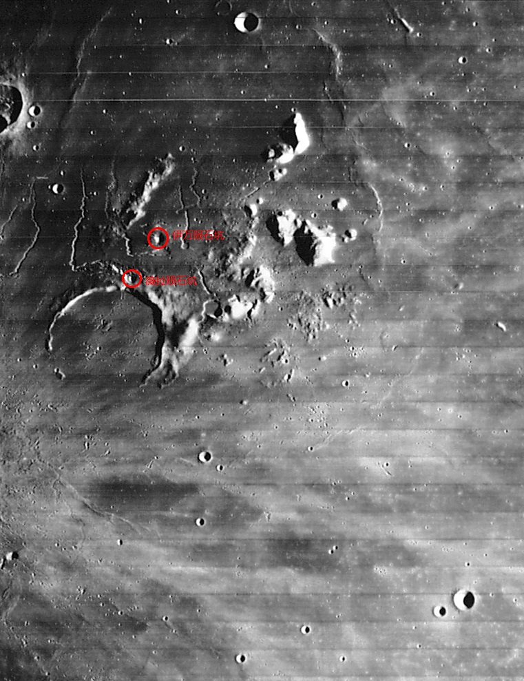 薇拉与伊万陨坑照片